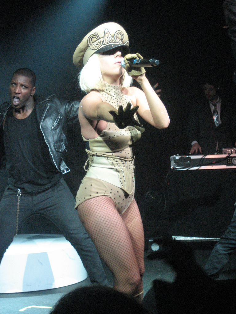 Lady Gaga concert